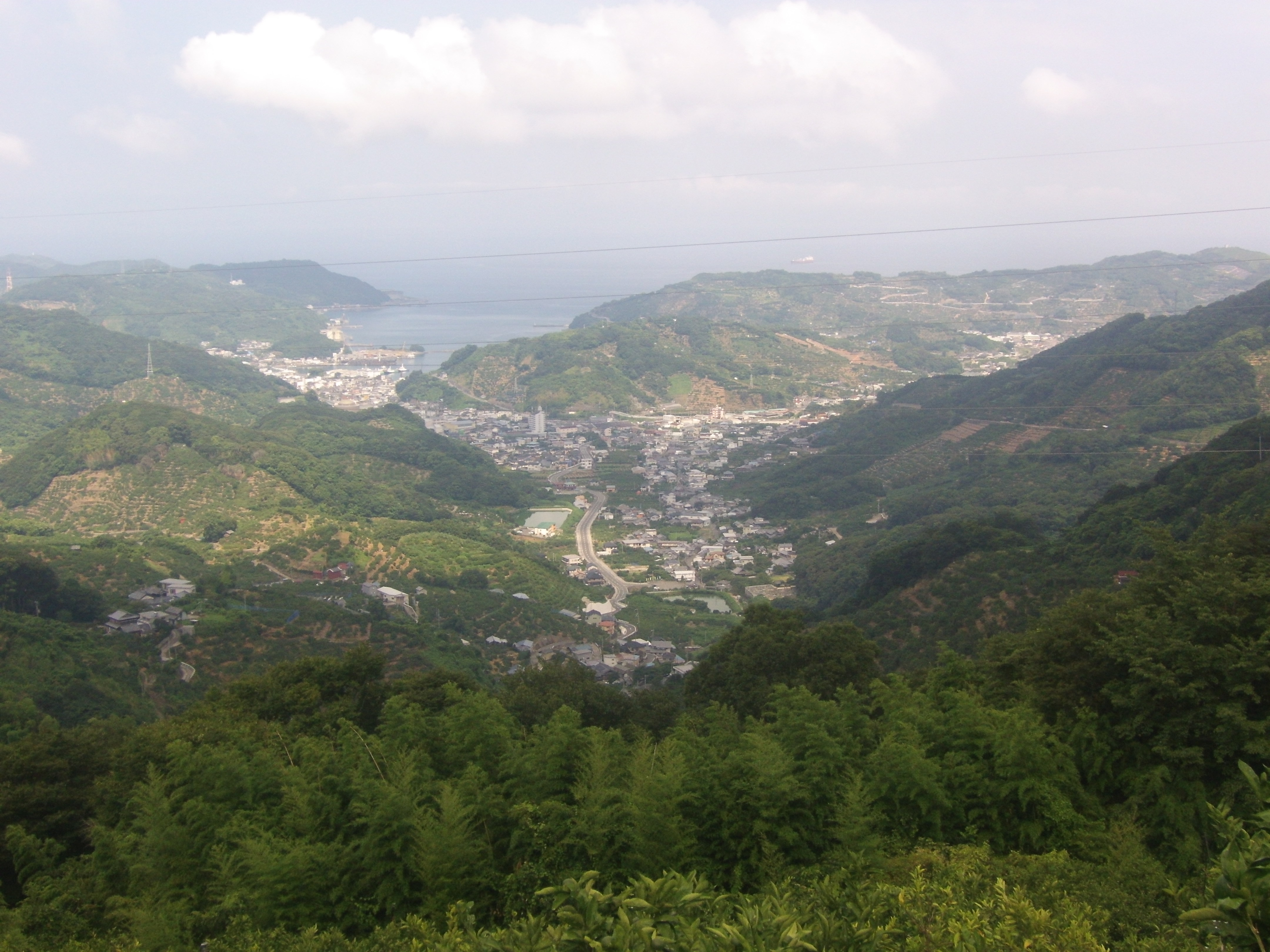 熊野古道・紀伊路の拝ノ峠からの展望、下津を眺める